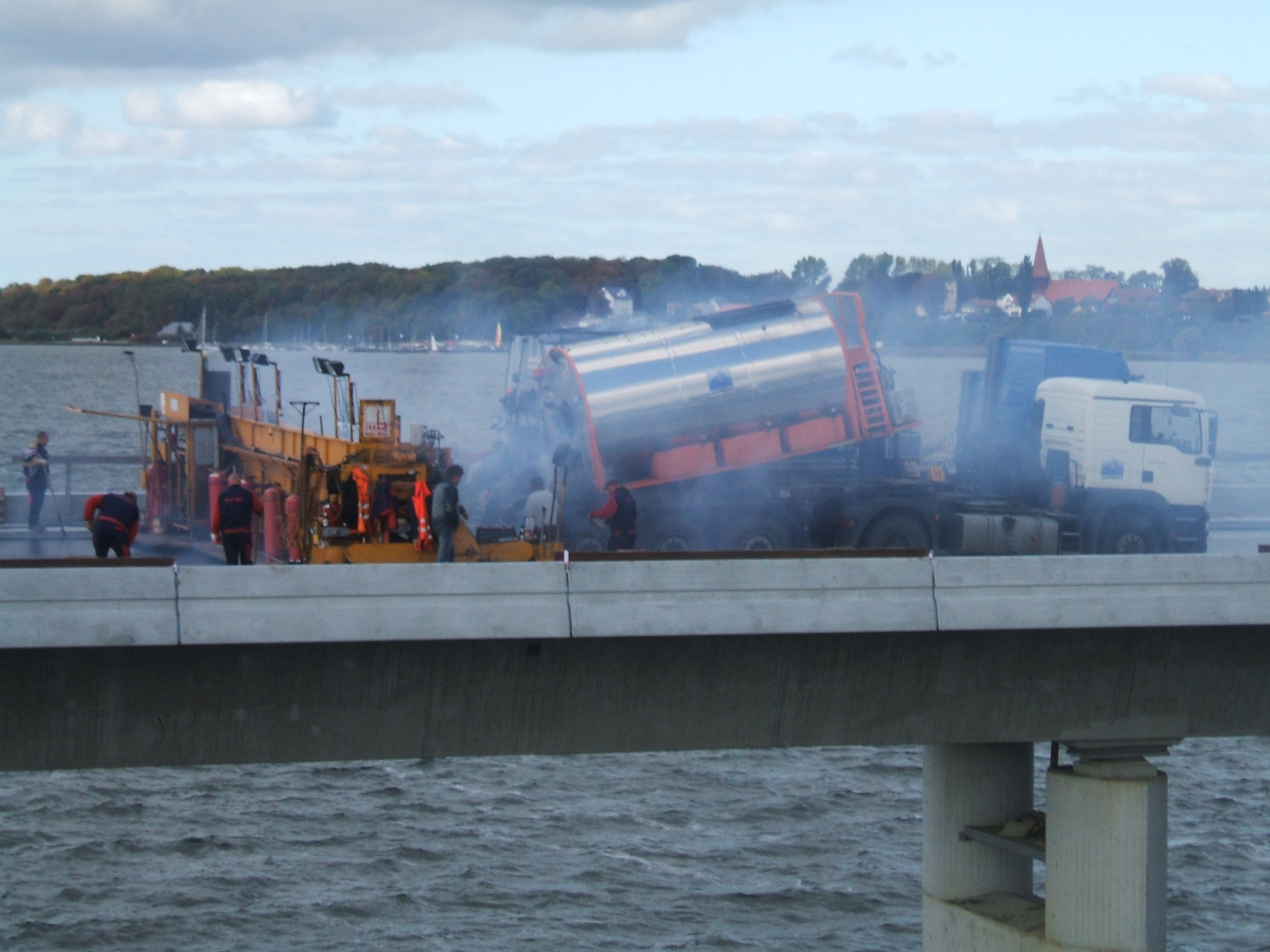 Rügenbrücke, Asphaltierung nahe Altefähr